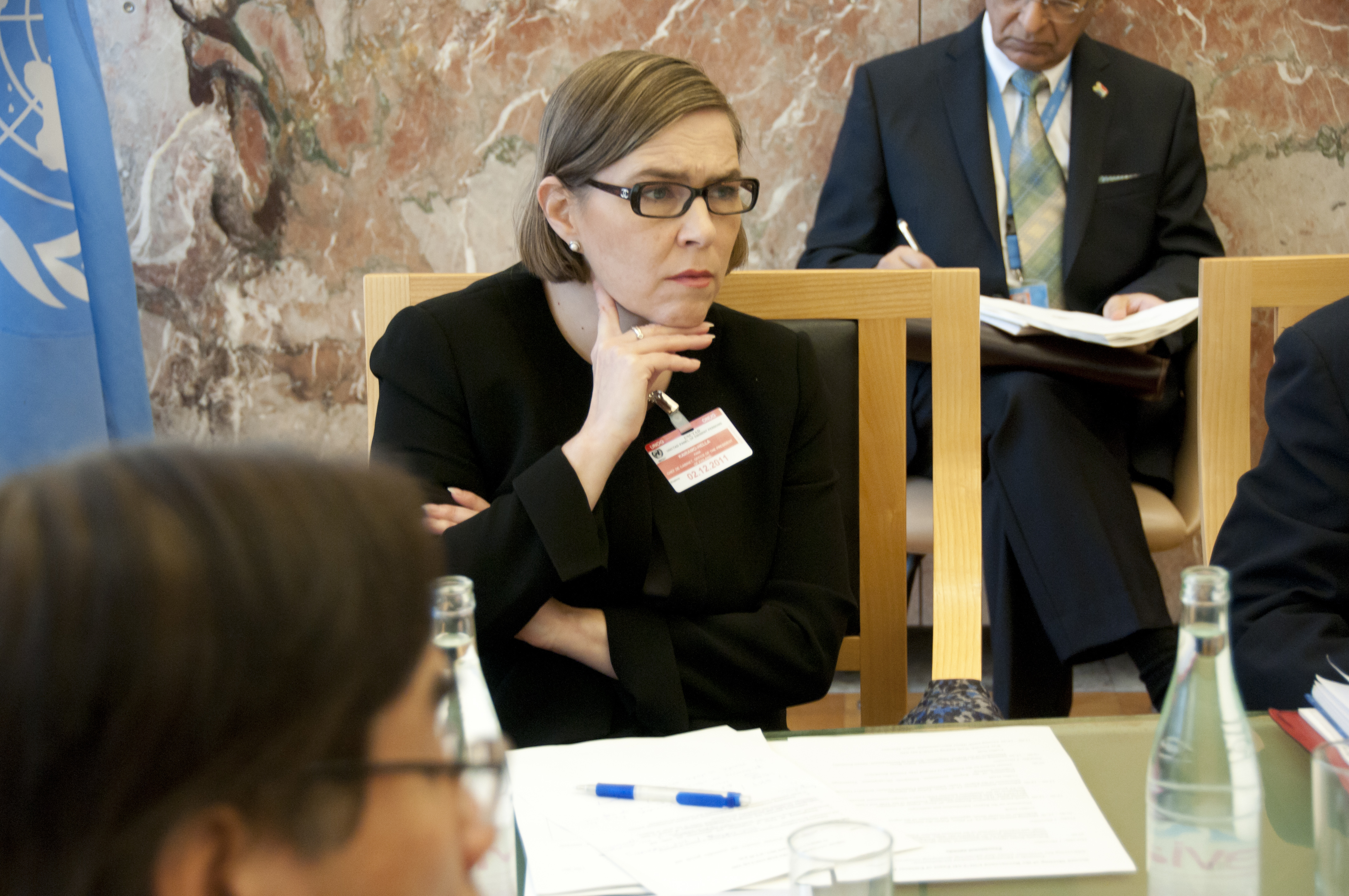 UNCTAD SG MEETING_DSC7869